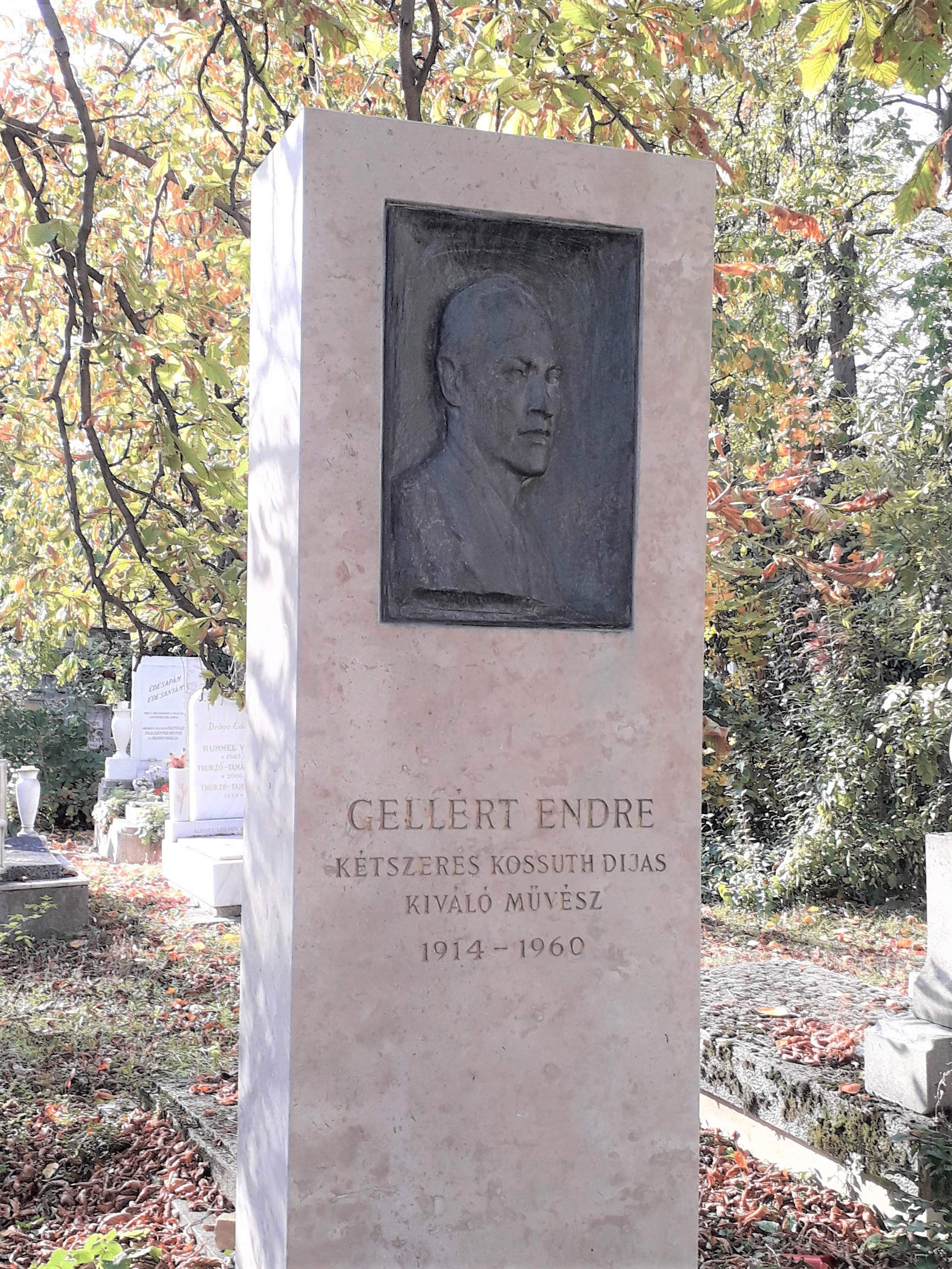 Gellért Endre (Budapest, 1914. október 1. - Budapest, 1960. március 1.) rendező, főiskolai tanár sírja Budapesten. Farkasréti temető: 41-1-160 [szobrász: Pátzay Pál].